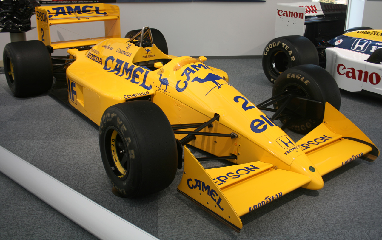 The Lotus 100T (#2 Satoru Nakajima)